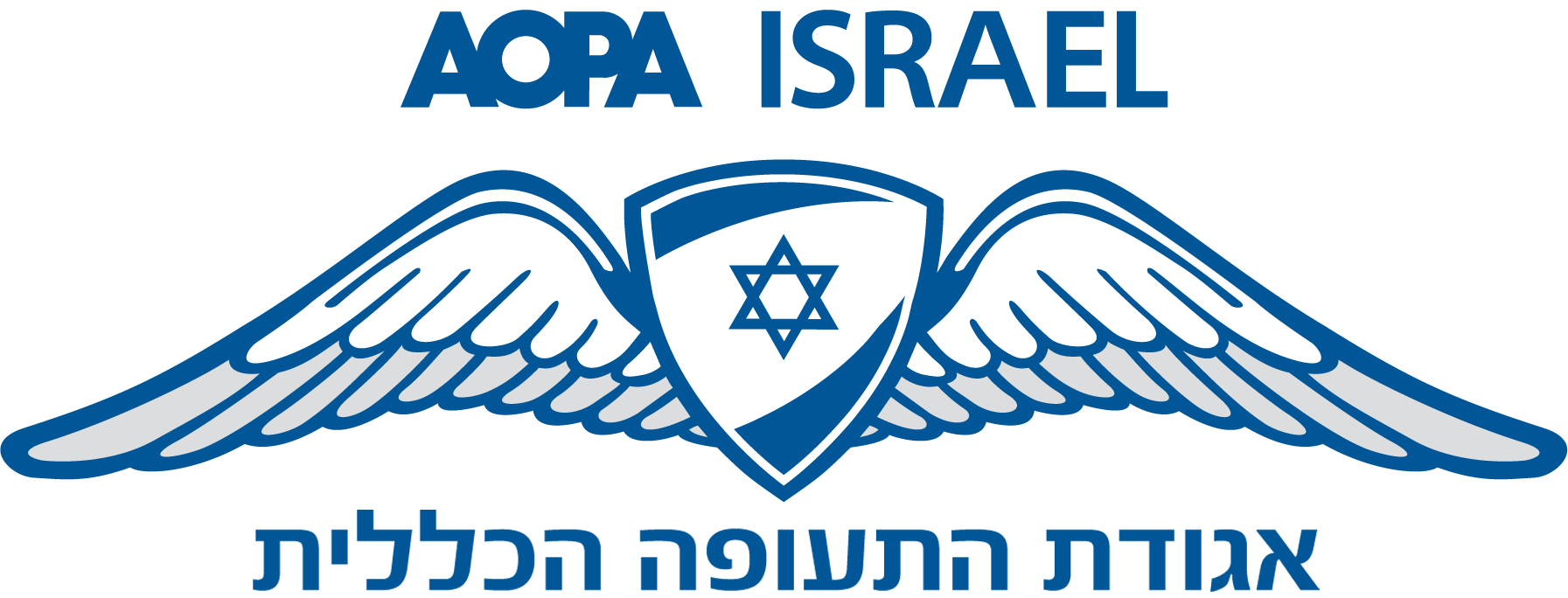 סמל אגודת התעופה הכללית בישראל